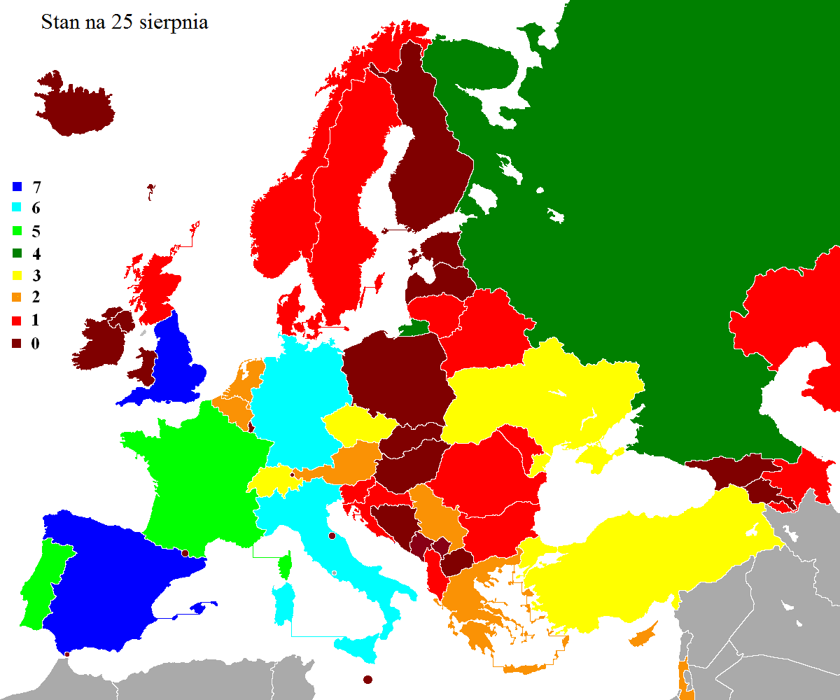 Wykaz ilości drużyn biorących udział w pucharach europejskich